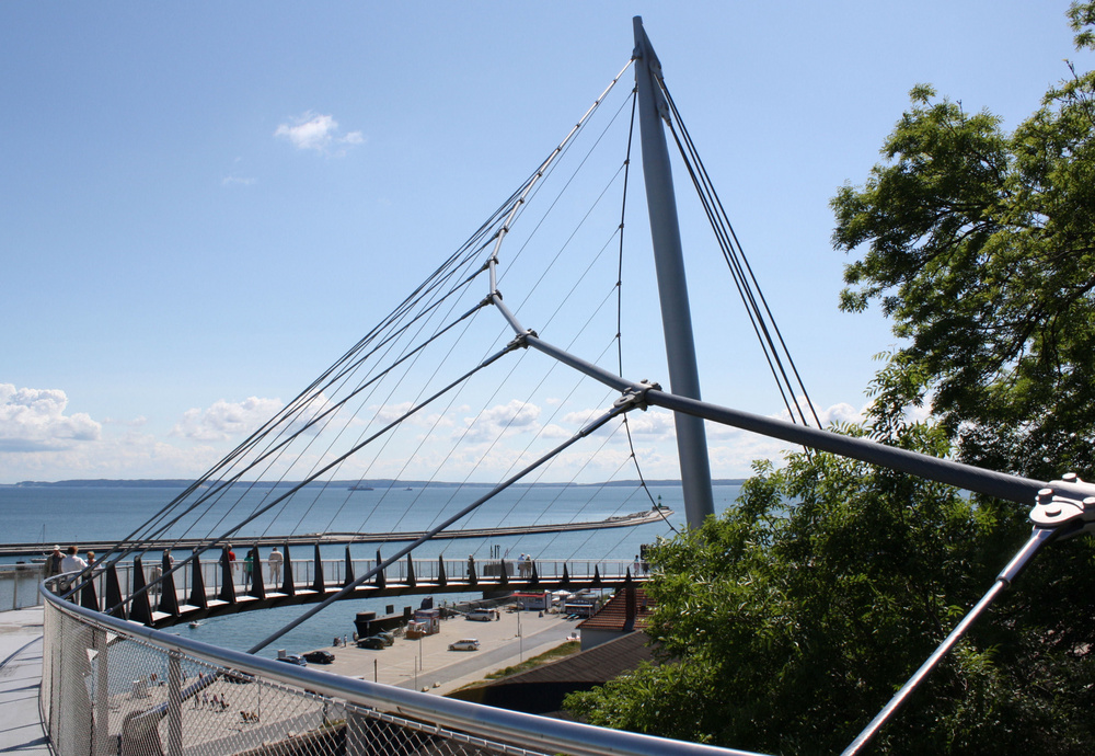 Hängebrücke verbindet die Innenstadt mit dem Hafen